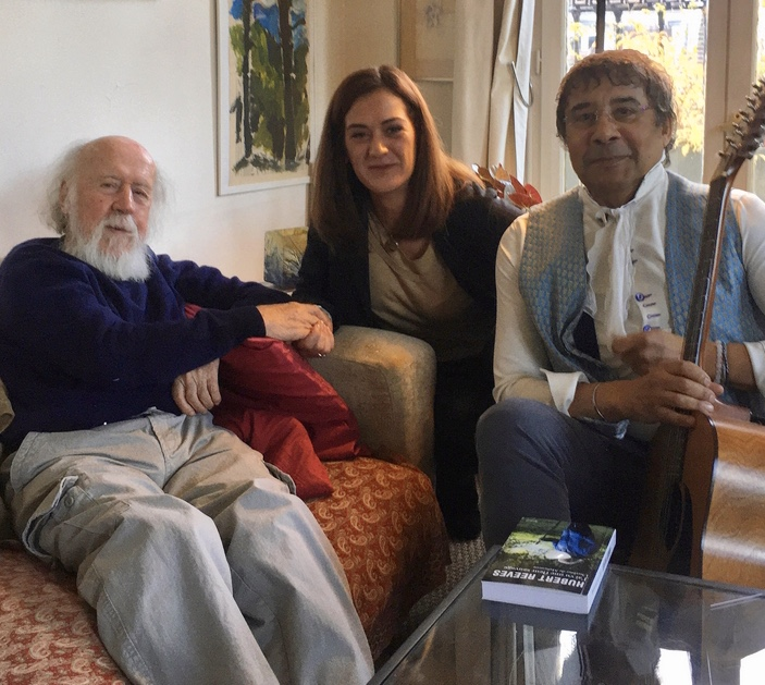 Rencontre Hubert Reeves (Président d'Honneur), Sandrine Bélier (Directrice) de l'association Humanité et Biodiversité avec Laurent Voulzy le 5 novembre 2019